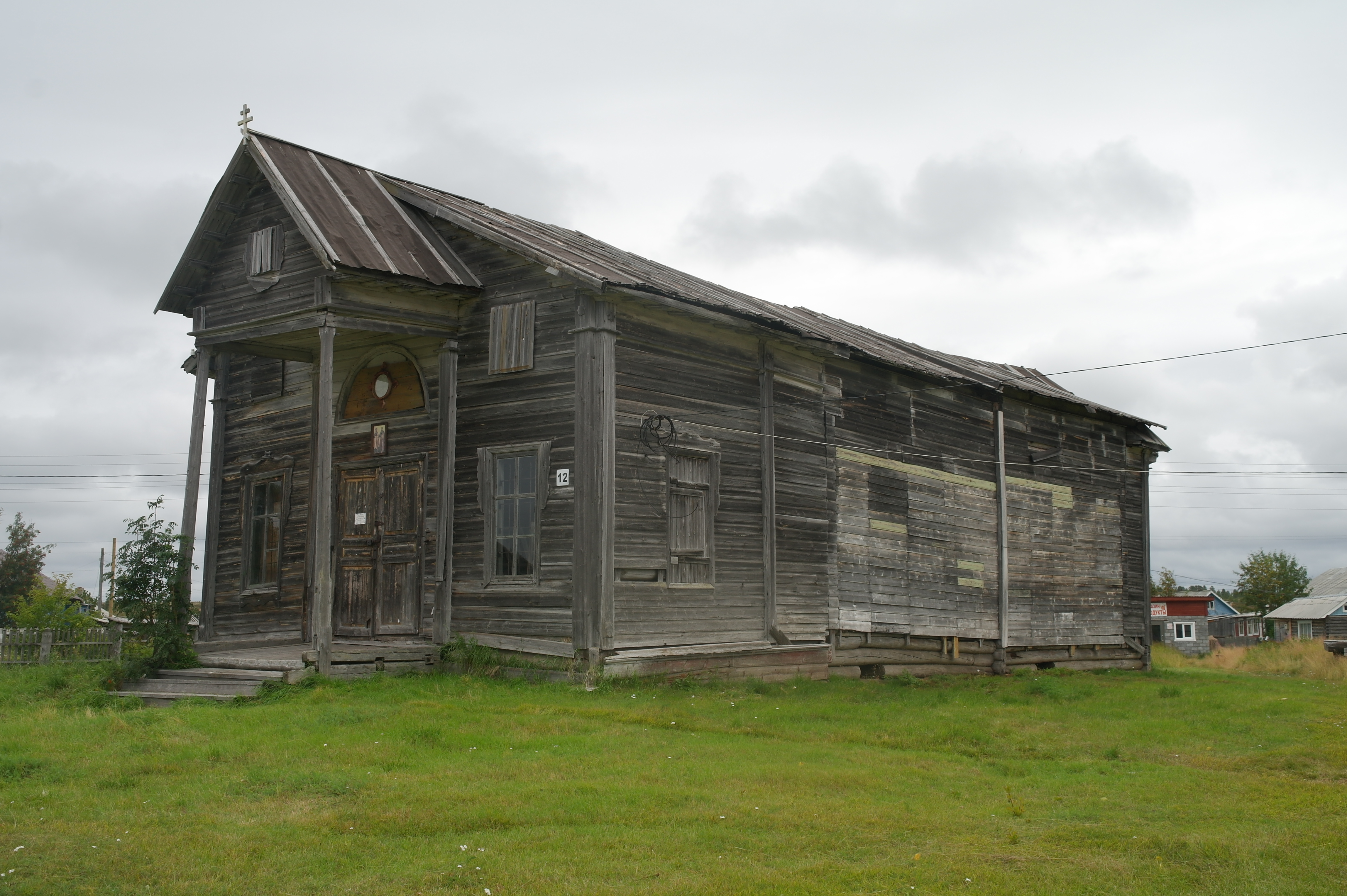 Церковь Петра и Павла: улица Никольская, 12, Варзуга, Терский район, Мурманская область